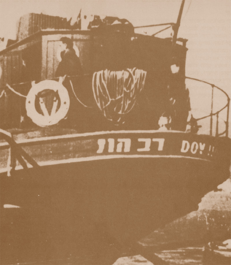 דב הוז אוניית מעפילים 1946 ארכיון ההגנה